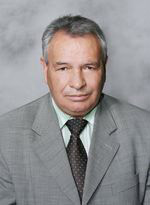 Српски (ћирилица): Професор др Мило Бошковић